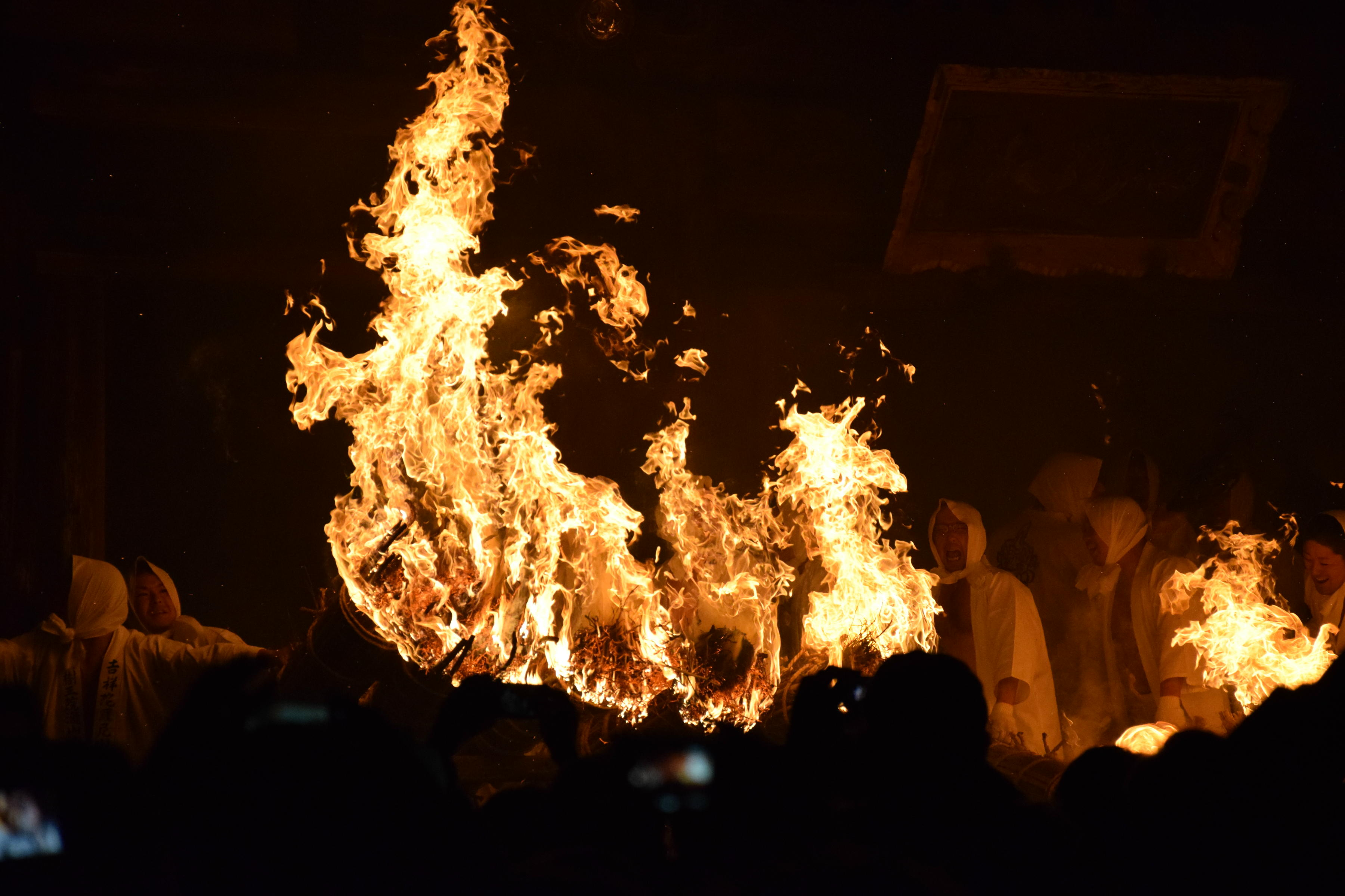 滝山寺鬼まつり